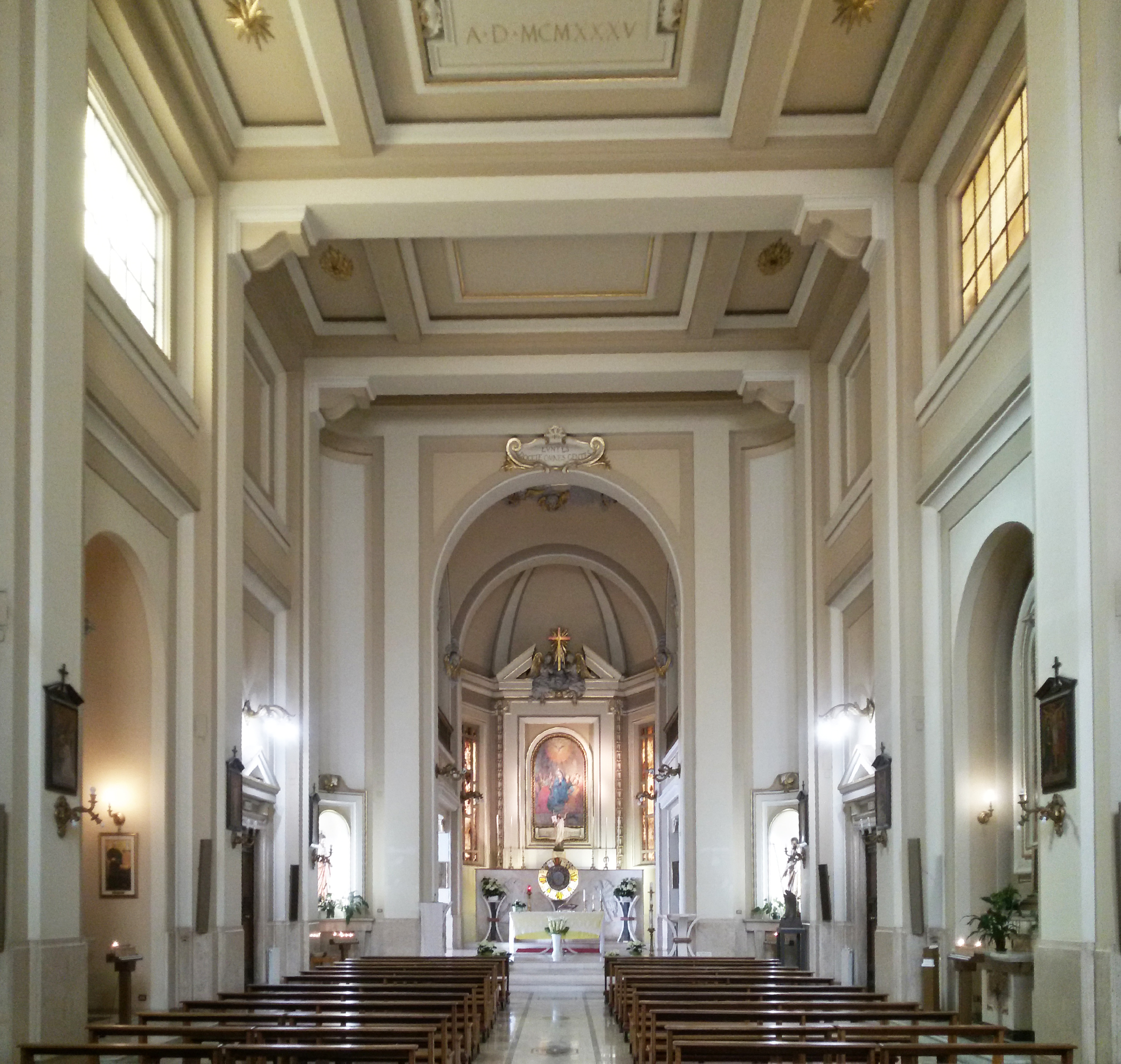 Interno.